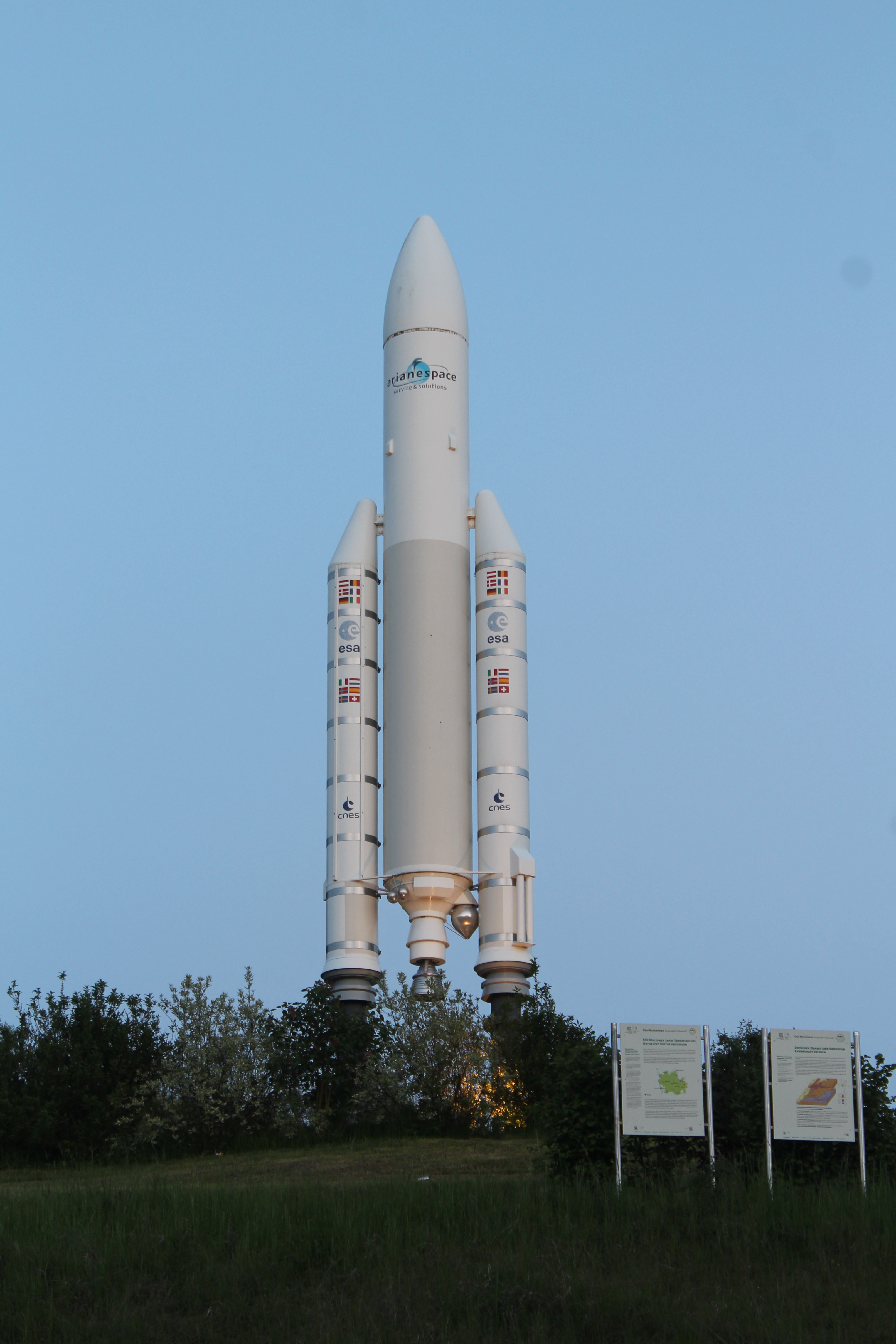 Ariane5-Modell Hardheim